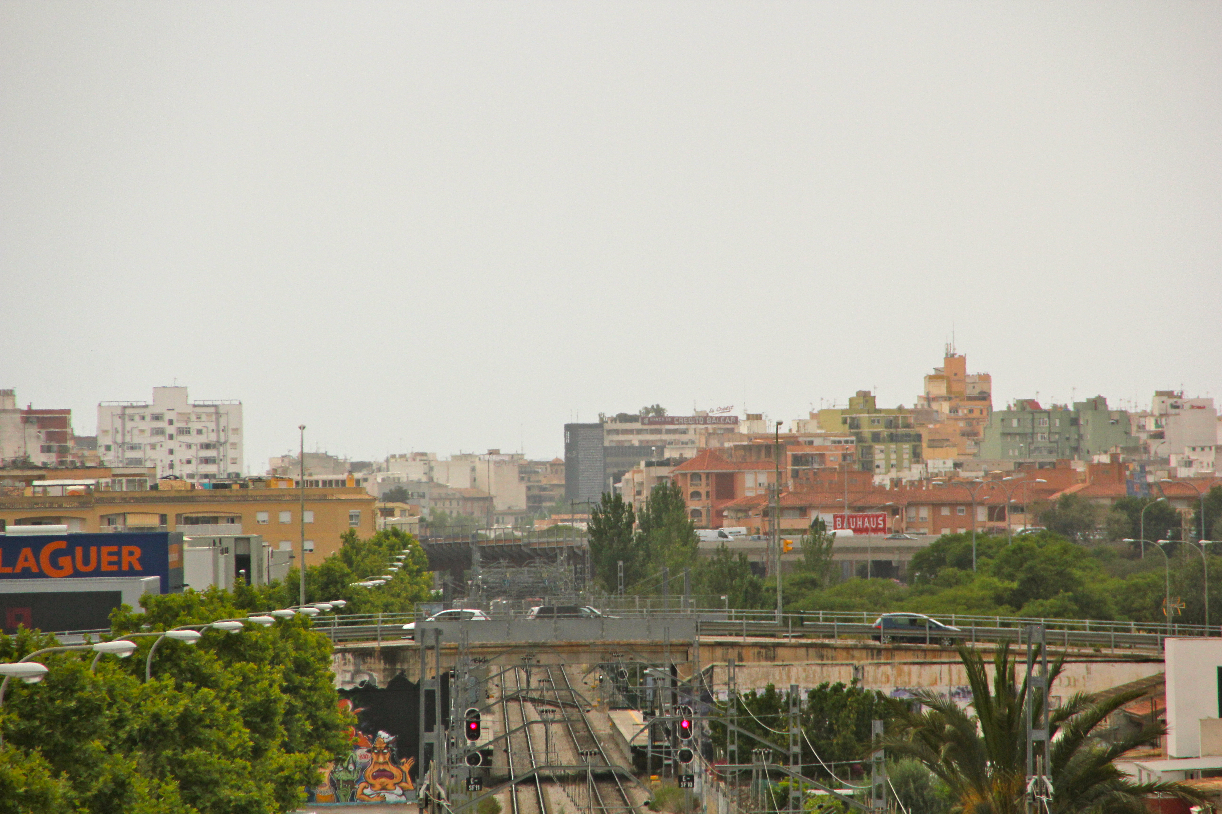 Pont sobre la via del tren a Son Fuster